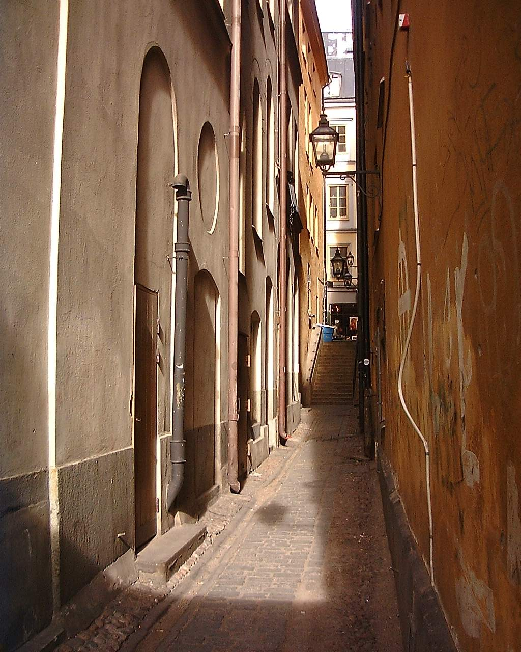 Sun sneaking into Torgdragargränd, Gamla stan, Stockholm.